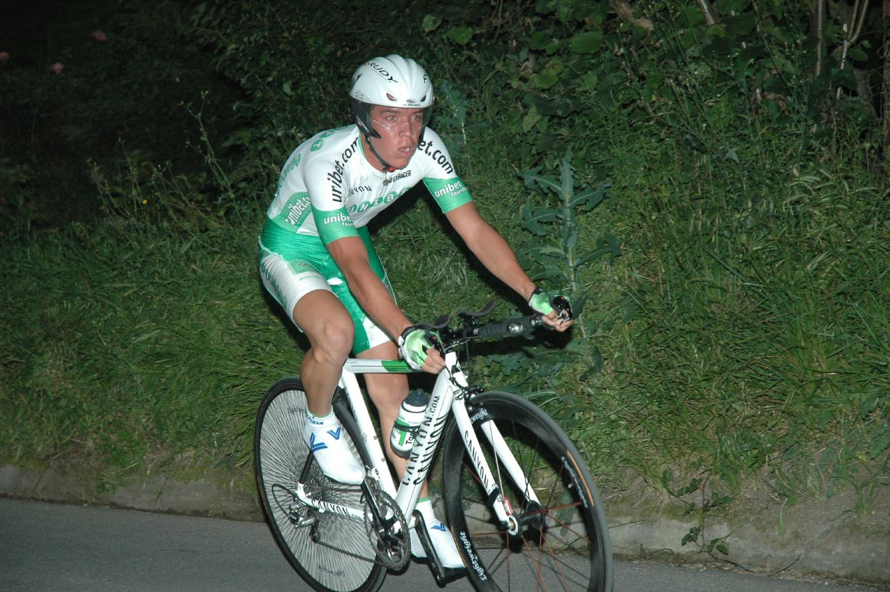 Rigoberto Uràn, Euskal Bizikleta 2007